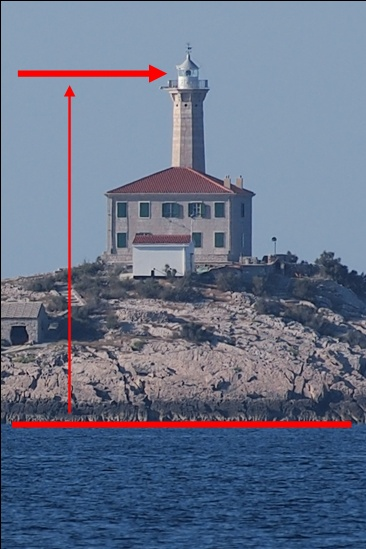 Feuerhöhe = Höhe der Lichtquelle über Meer